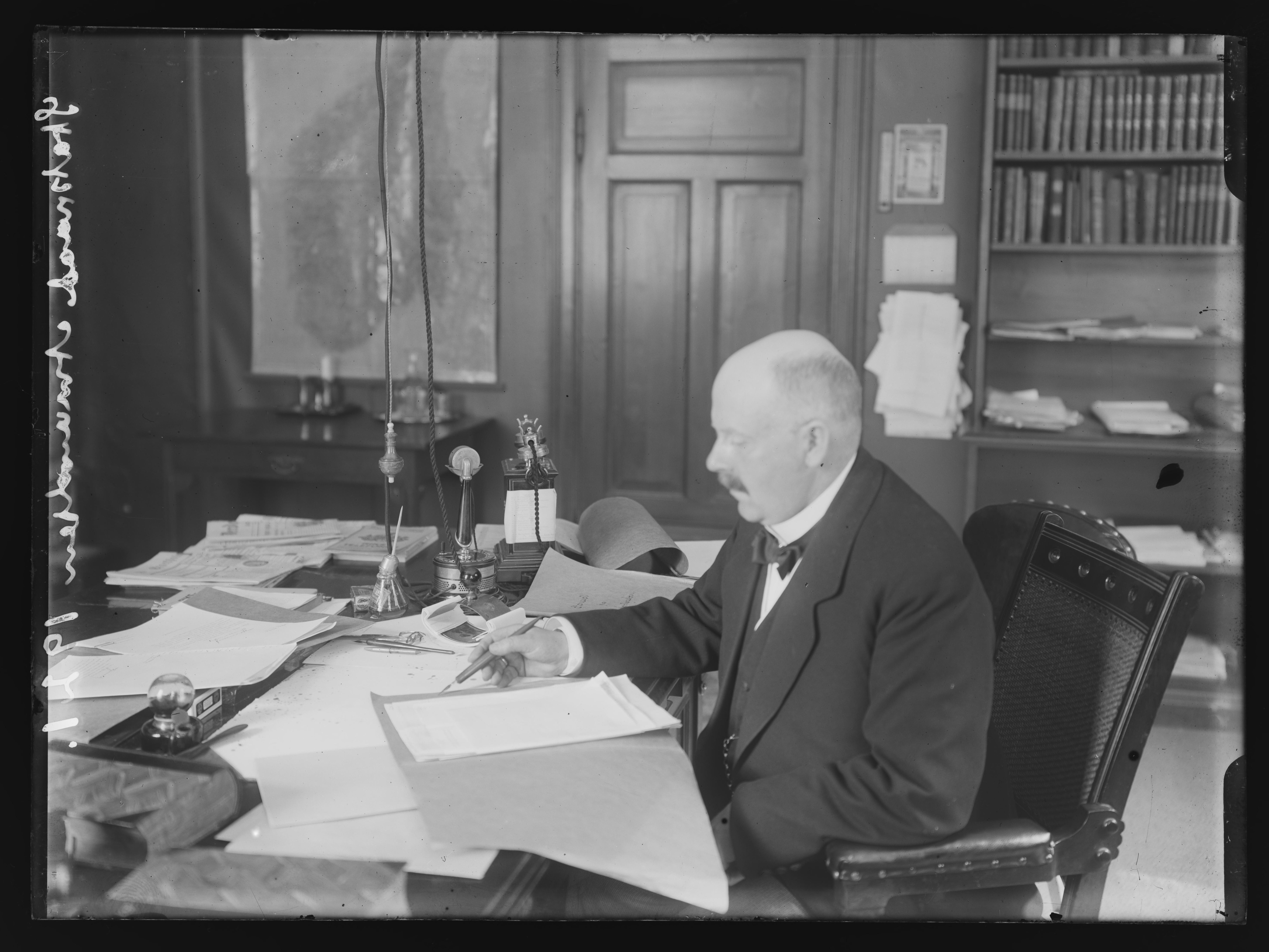 Bildet er hentet fra Nasjonalbibliotekets bildesamling. Anmerkninger til bildet var: Påskrift negativ: Statsraad Amundsen 1921 Depicted person: Amundsen, Olaf